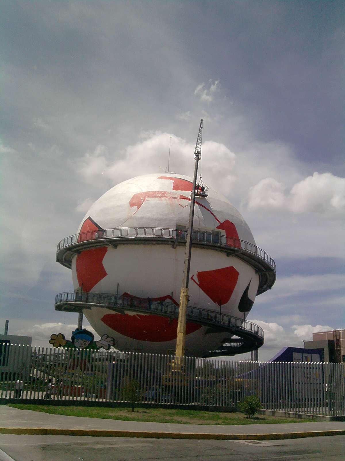 Alado de la Sede del Salón de la Fama del Fútbol — en el Parque David Ben Gurion en Pachuca de Soto, estado de Hidalgo, México. Estructura de 37 metros de alto, en forma de balon de fútbol.